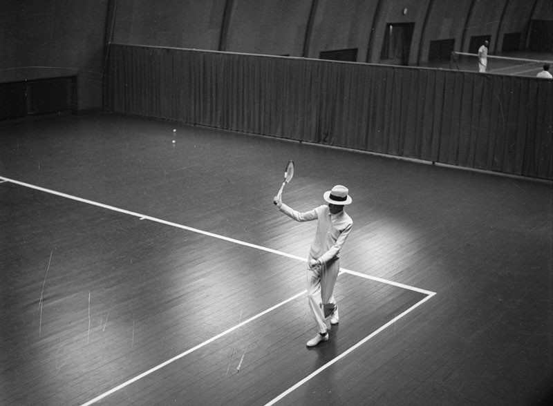 Fiskartorpsvägen 20, Tennisstadions A-hall. Kung Gustaf V spelar tennis